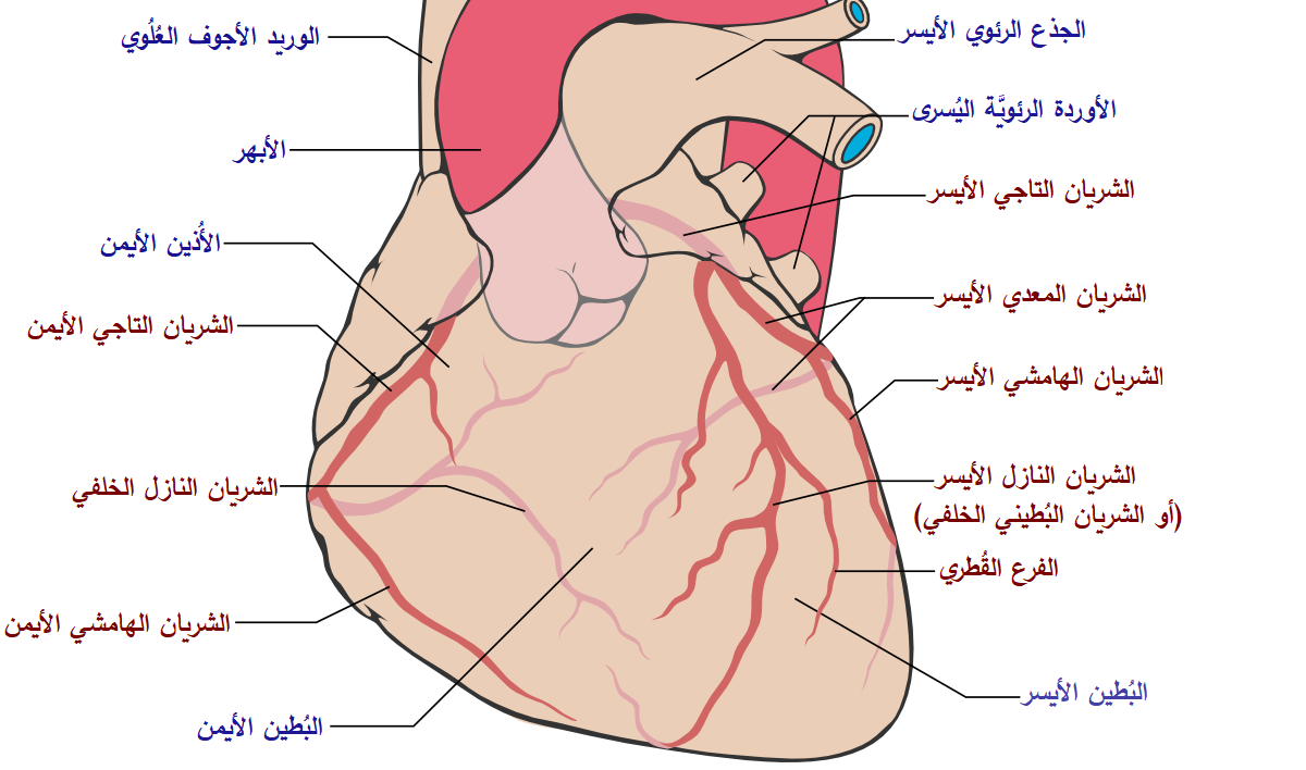 جهاز الدوران التاجي كما يبدو من الأمام، وتظهر الشرايين التاجيَّة بِاللون الأحمر، بينما تظهر غيرها بِالأزرق.